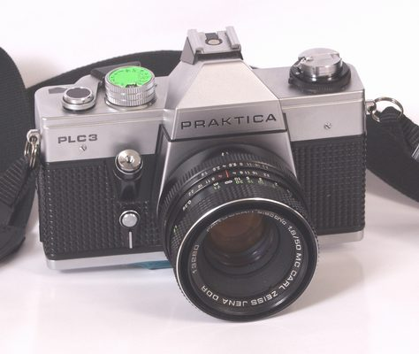 Aparat Practica PLC3 z obiektywem Pancolar electric 1,8/50, autor zdjęcia: Andrzej Tymiński.